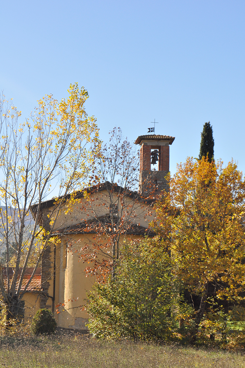 La nuova chiesa è stata ricostruita nel 1957.